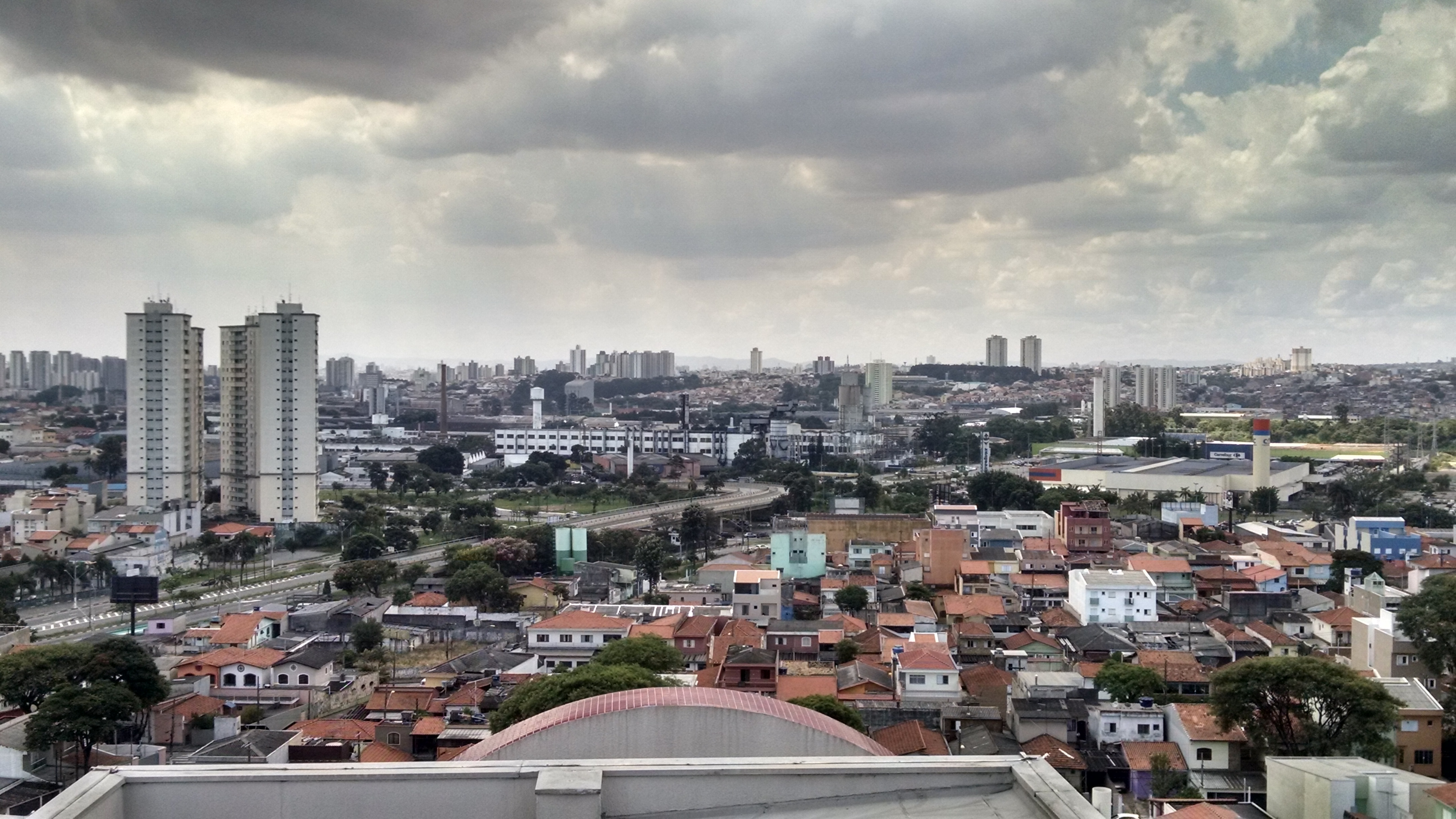 Estádio Municipal Bruno José Daniel e Redores